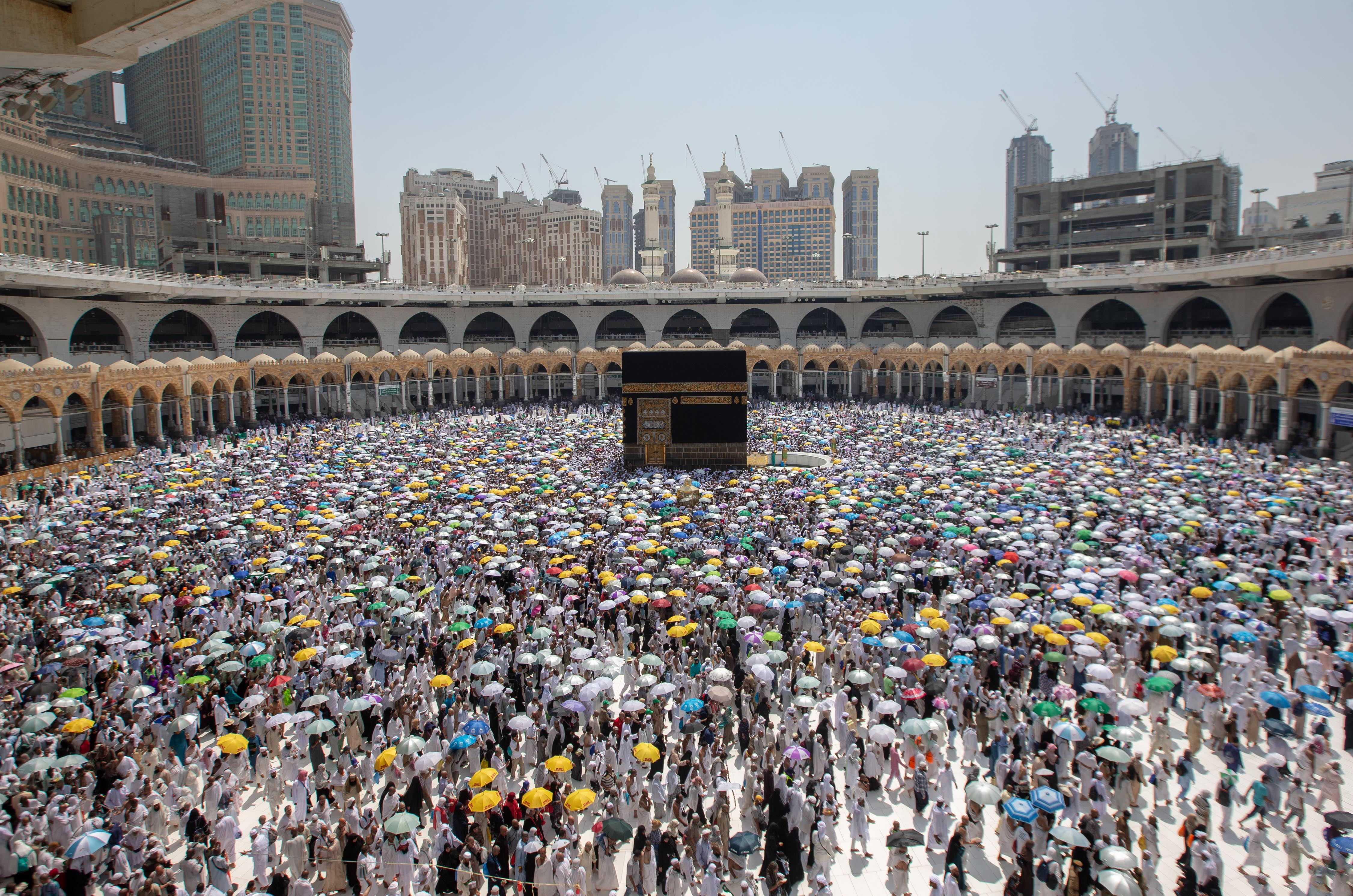 صحن المطاف